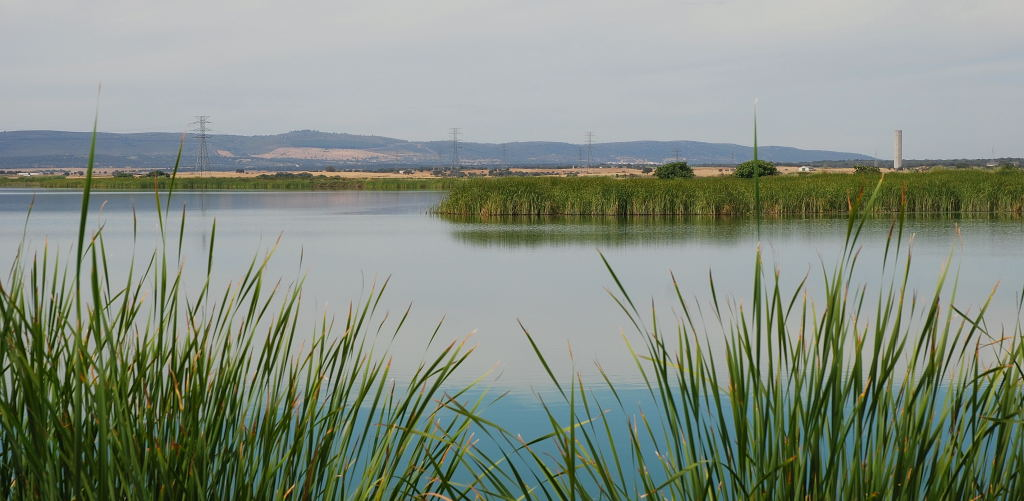 Embalse de Arrocampo en Saucedilla (Cáceres)